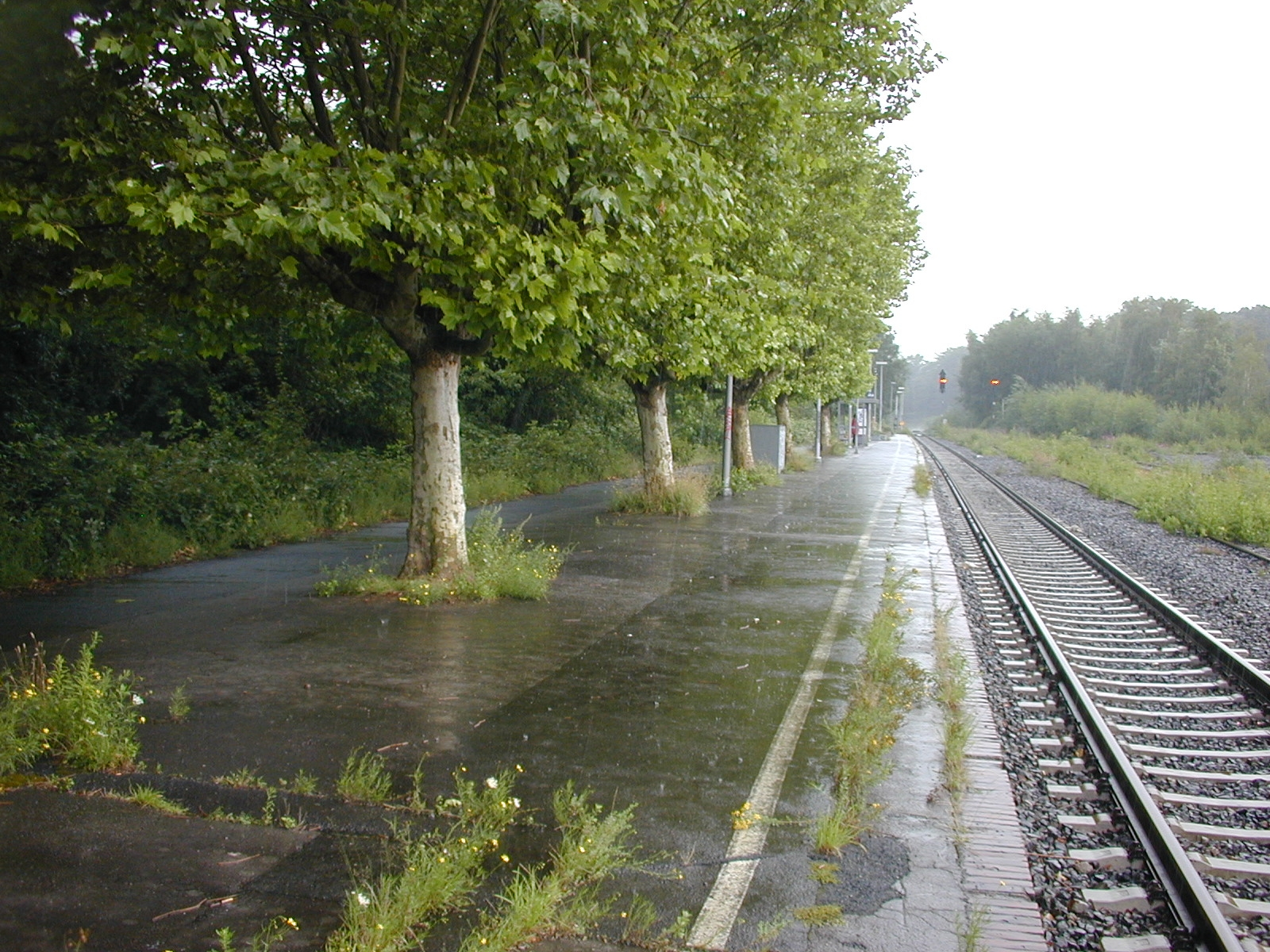 Bahnhof Dortmund-Boevinghausen